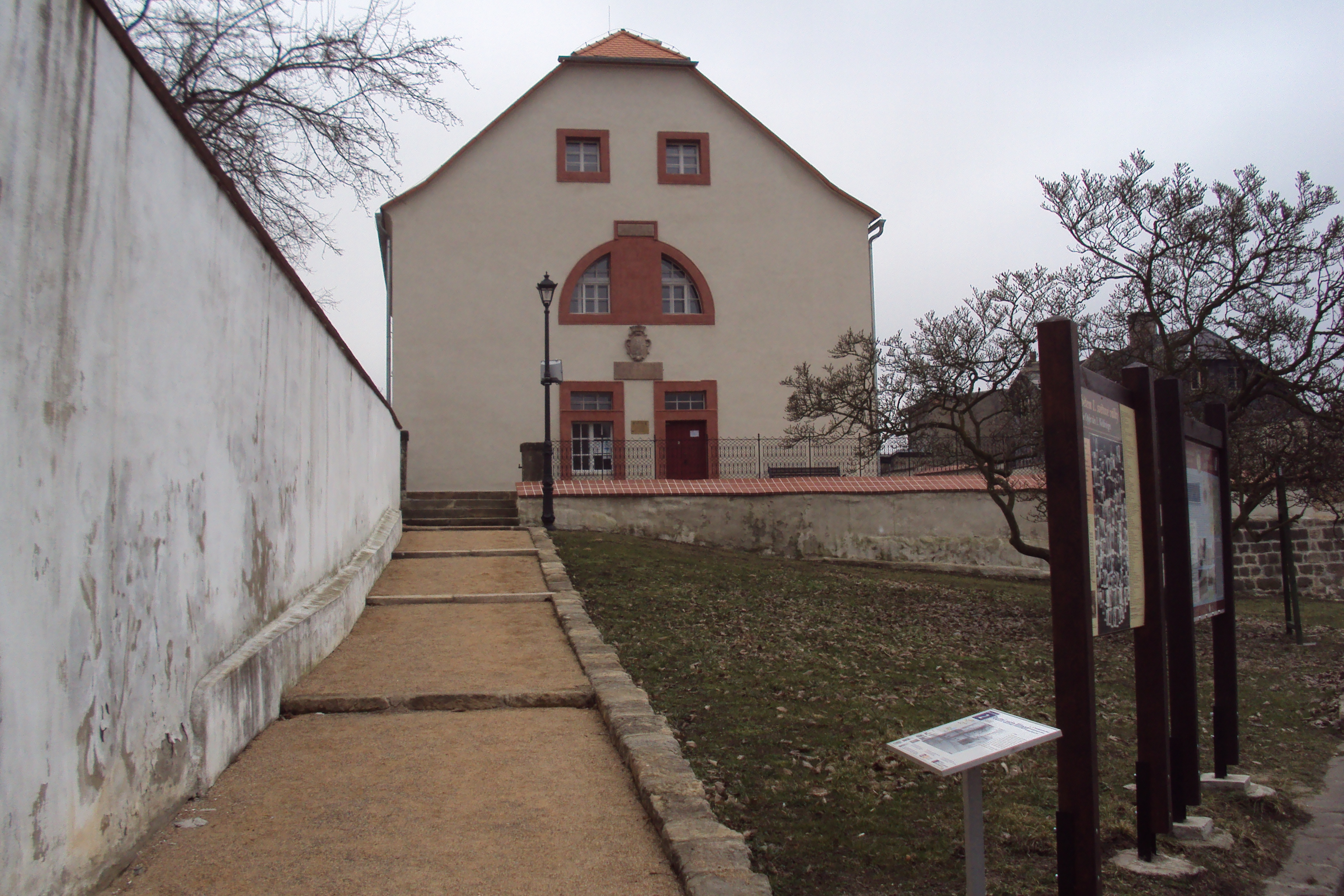 Bývalý špitál, dnes městské muzeum, součást Poutní městské trasy Mimoň odspodu ze silnice